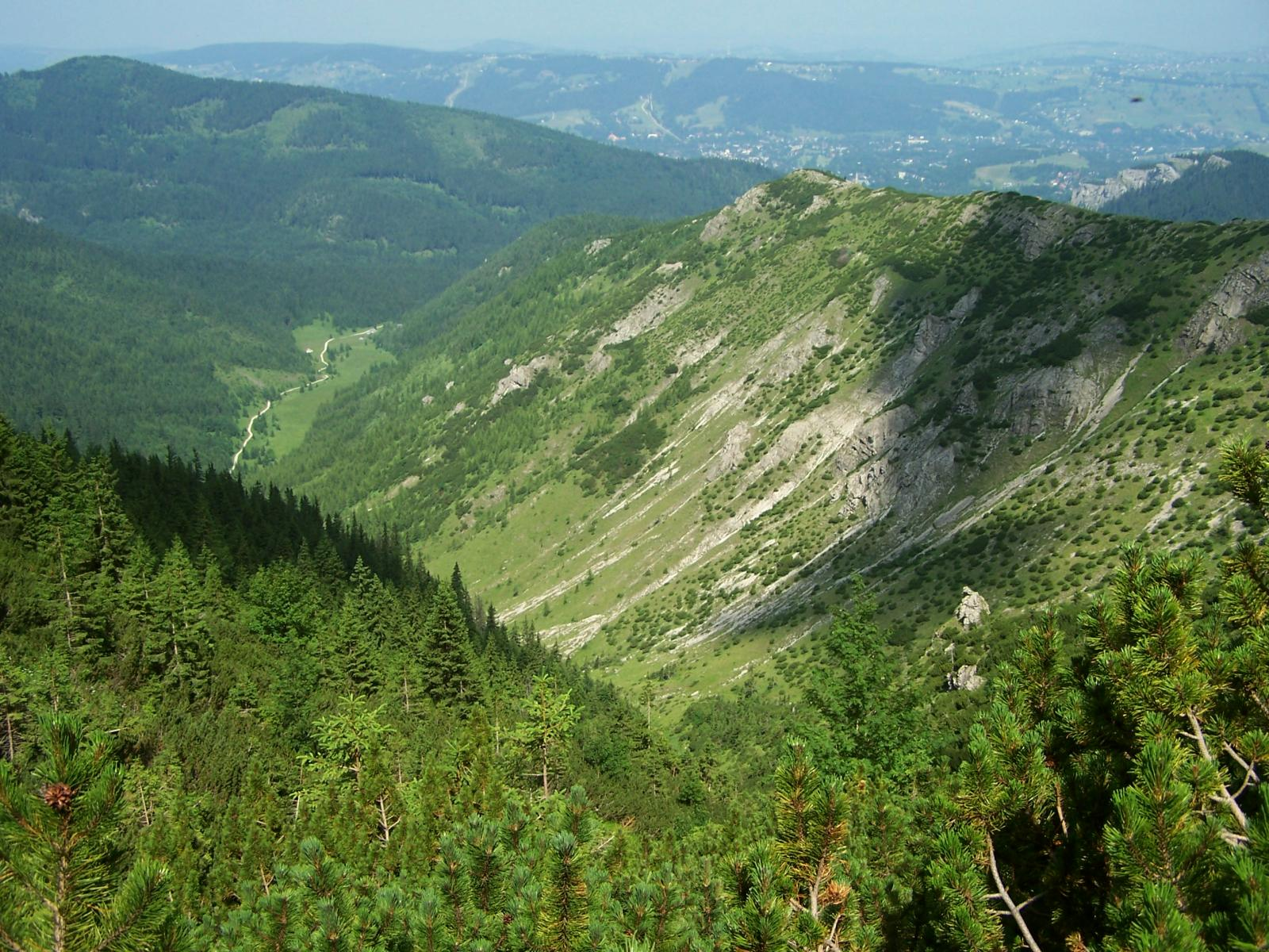 Dolina Jaworzynki (Tatra Mountains)